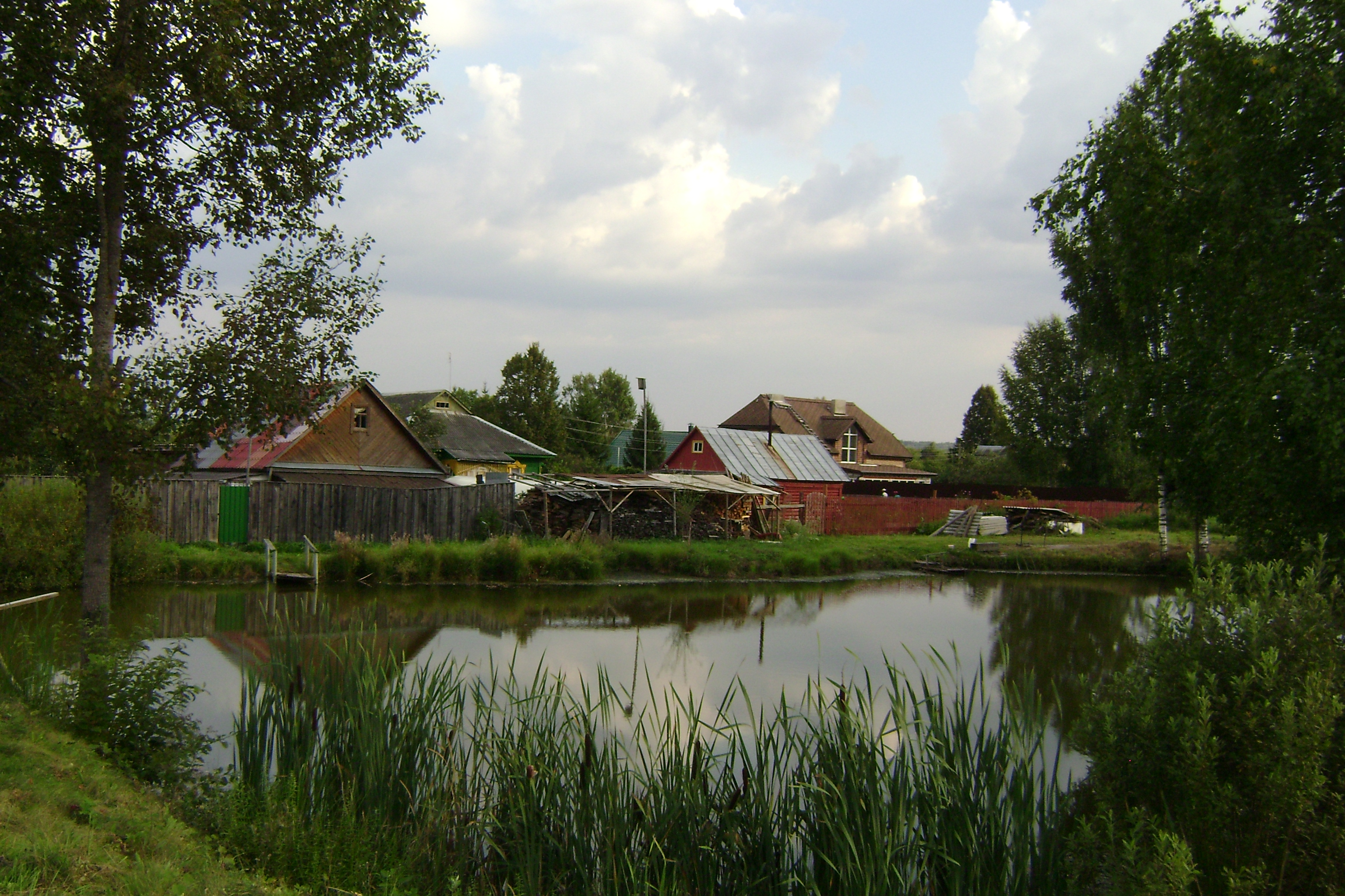 Пожарный пруд